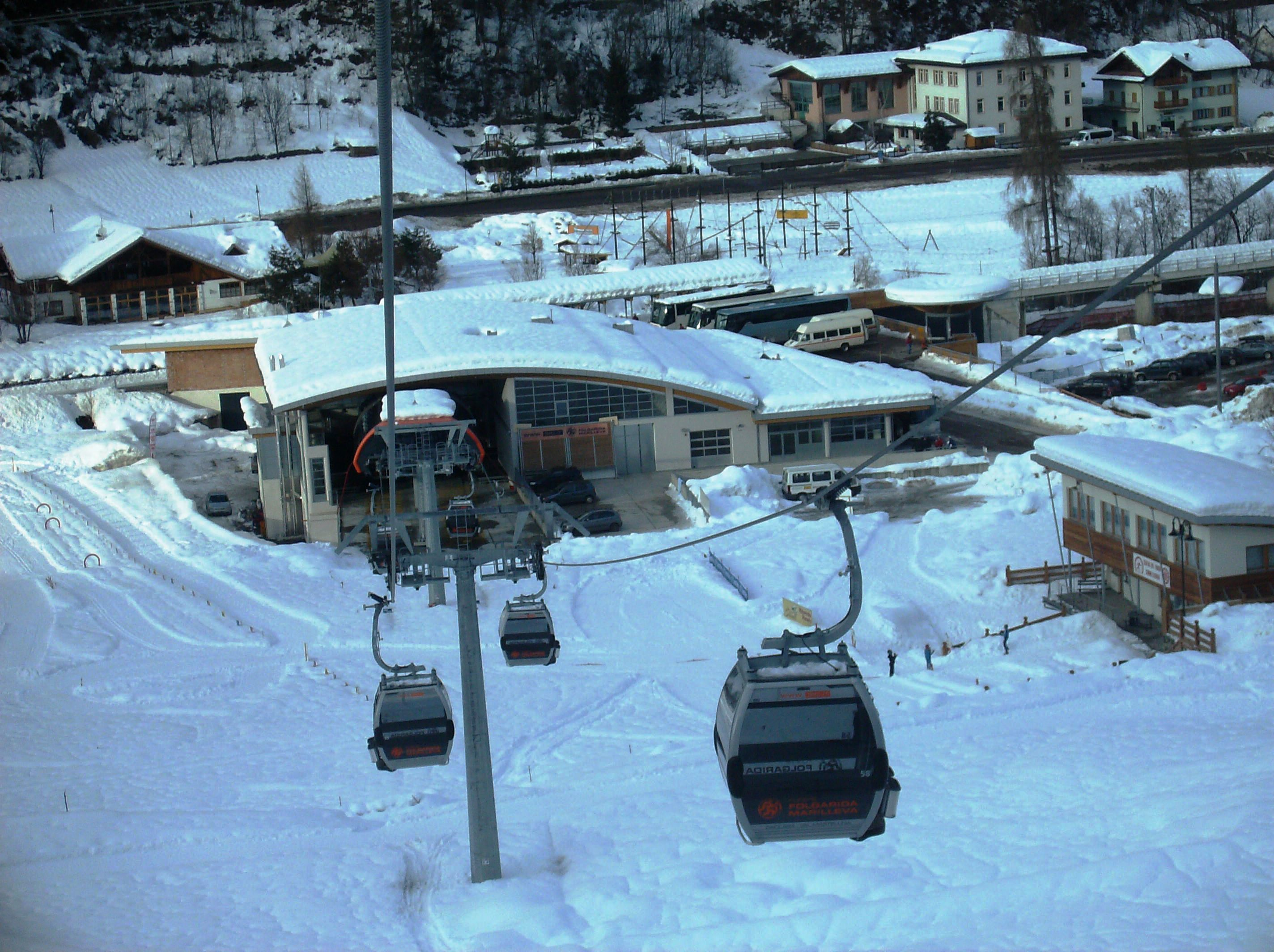 Train and ski - Daolasa - Trento - Italie